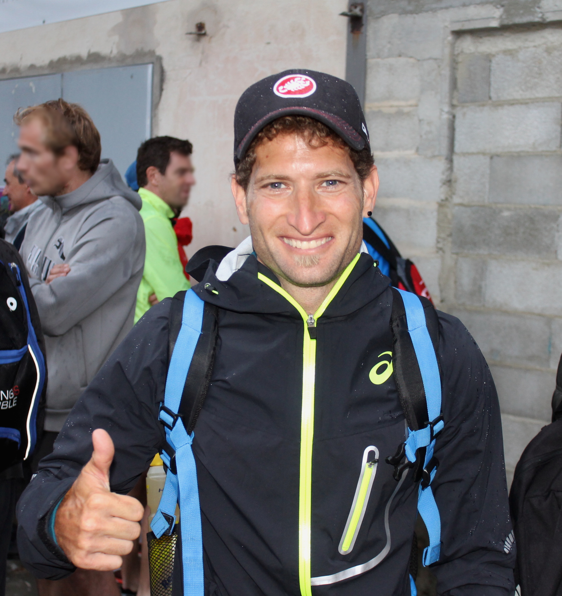 Marcel Zamora Perez Ventouxman 2016